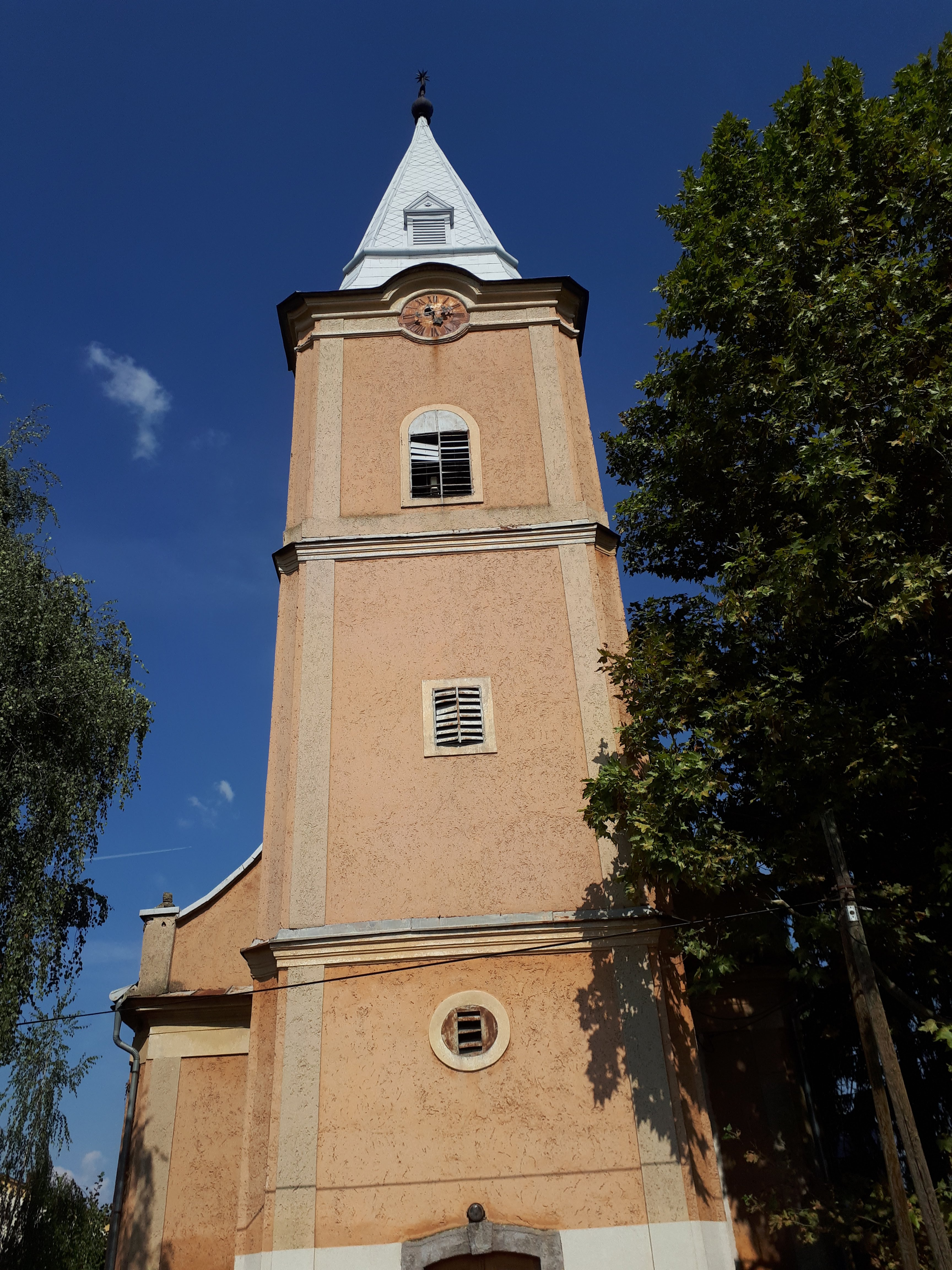 Az 1788-1790 közt épült ároktői református templom tornya